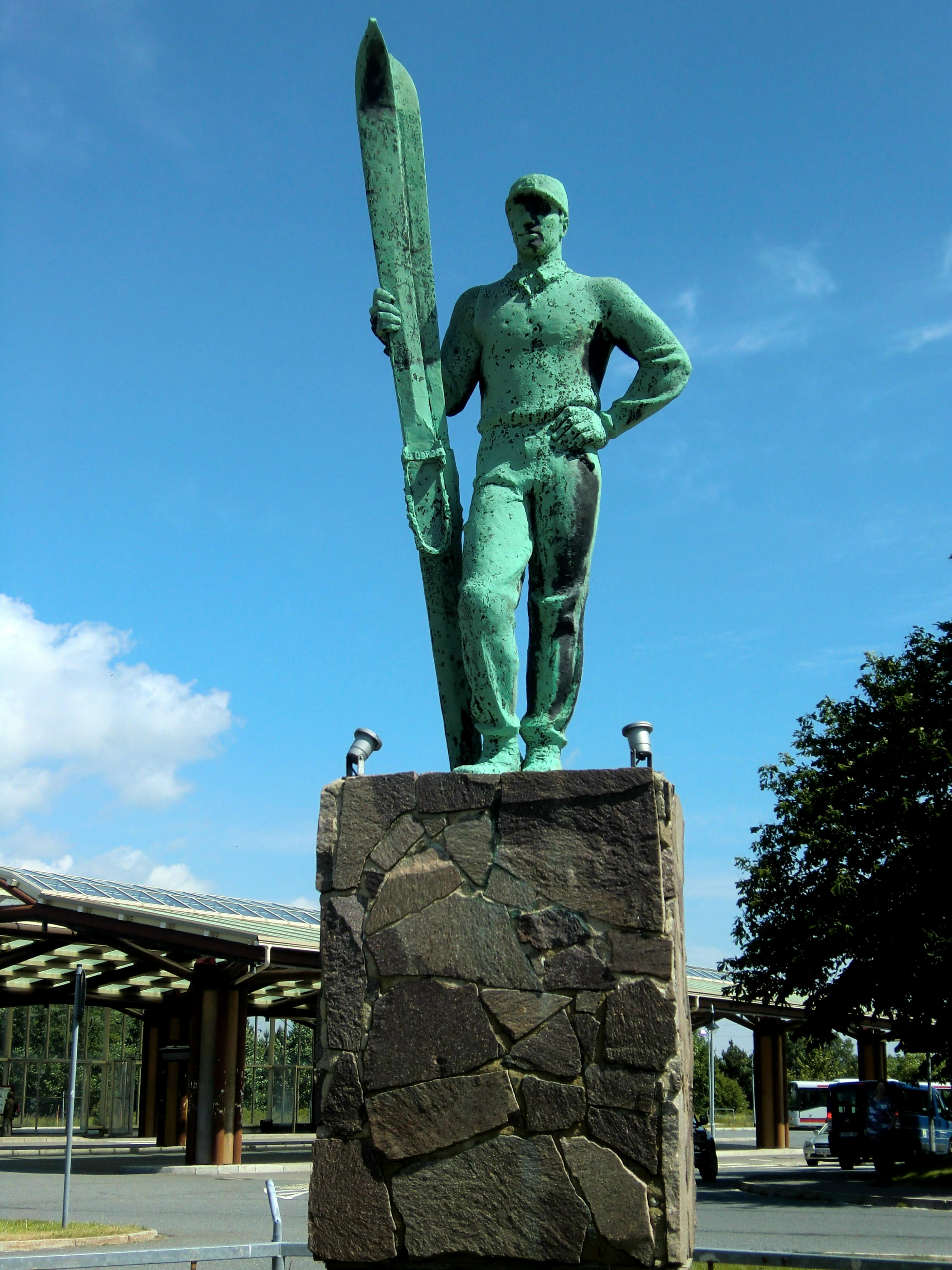 Altenberg, Denkmal Skiläufer vom Dresdner Bildhauer Rudolf Löhner auf dem Bahnhofsvorplatz Altenberg